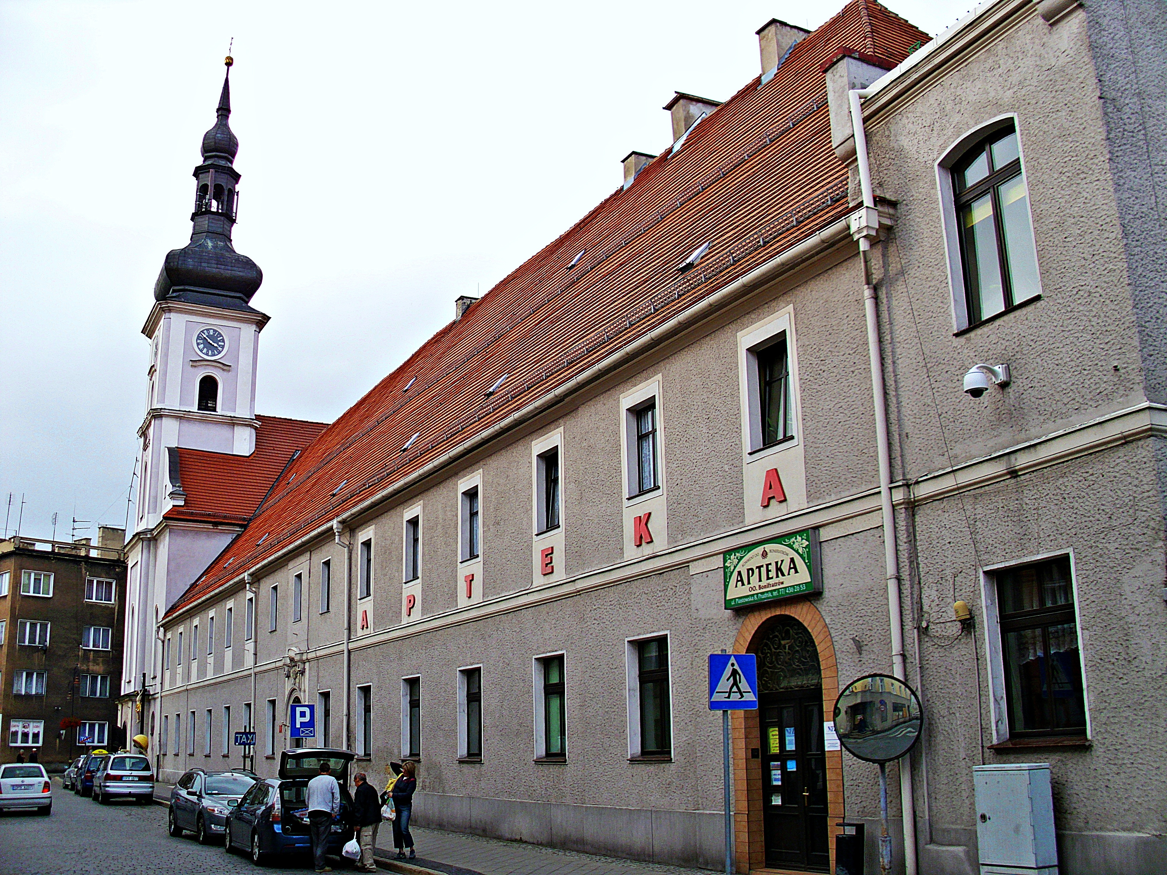 Prudnik, Zespół klasztorny bonifratrów, 1783–1787: - kościół, ob. par. p.w. śś. Piotra i Pawła, - klasztor